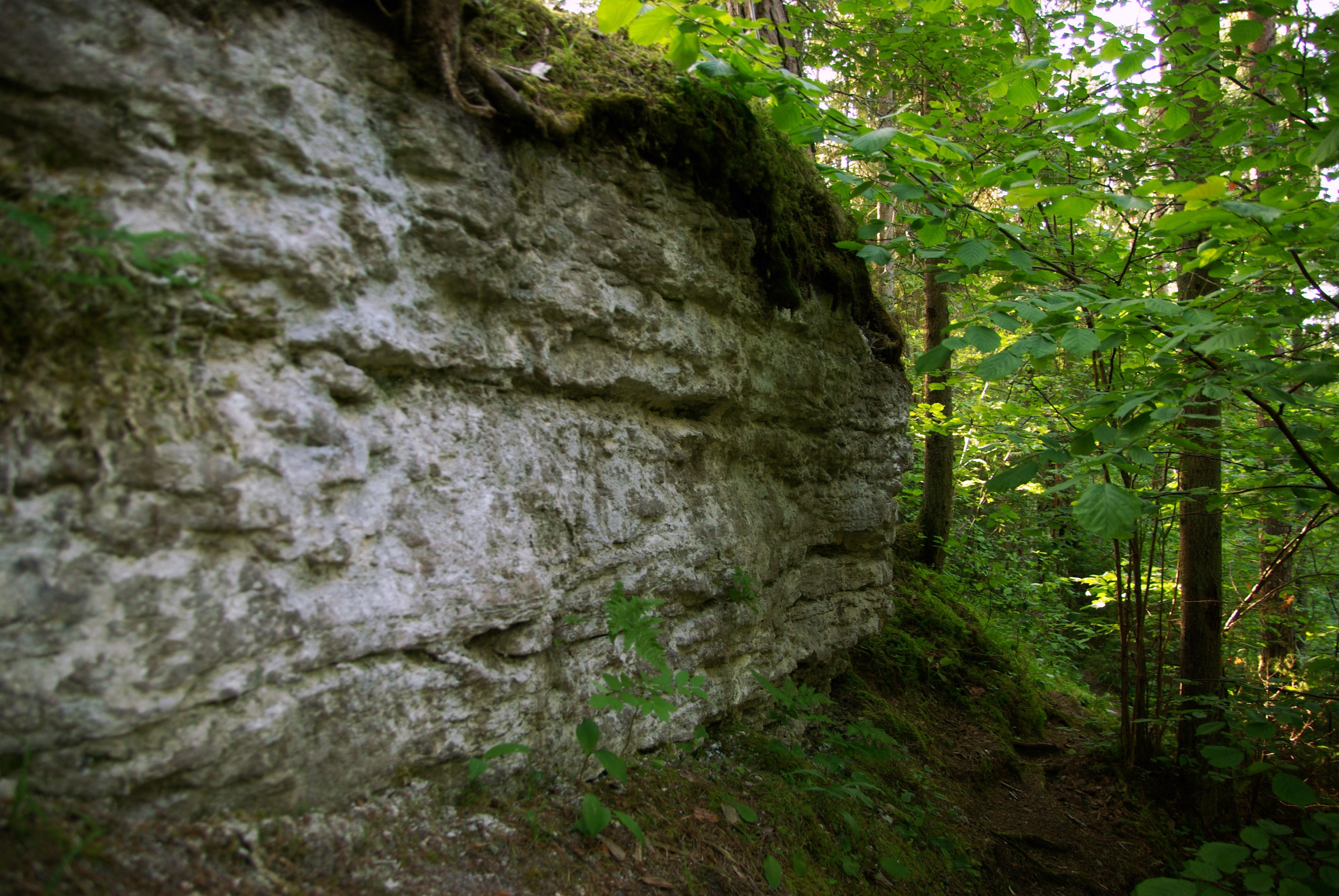 Vahtrepa ehk Kallaste pank asub Hiiumaal Vahtrepa külas.Metsa peitunud biohermne riff on kuni 10 m kõrge ja 400m pikk. Pangal kasvab rohkem kui 100 aasta vanune männik ja mitmeid haruldasi taimeliike.